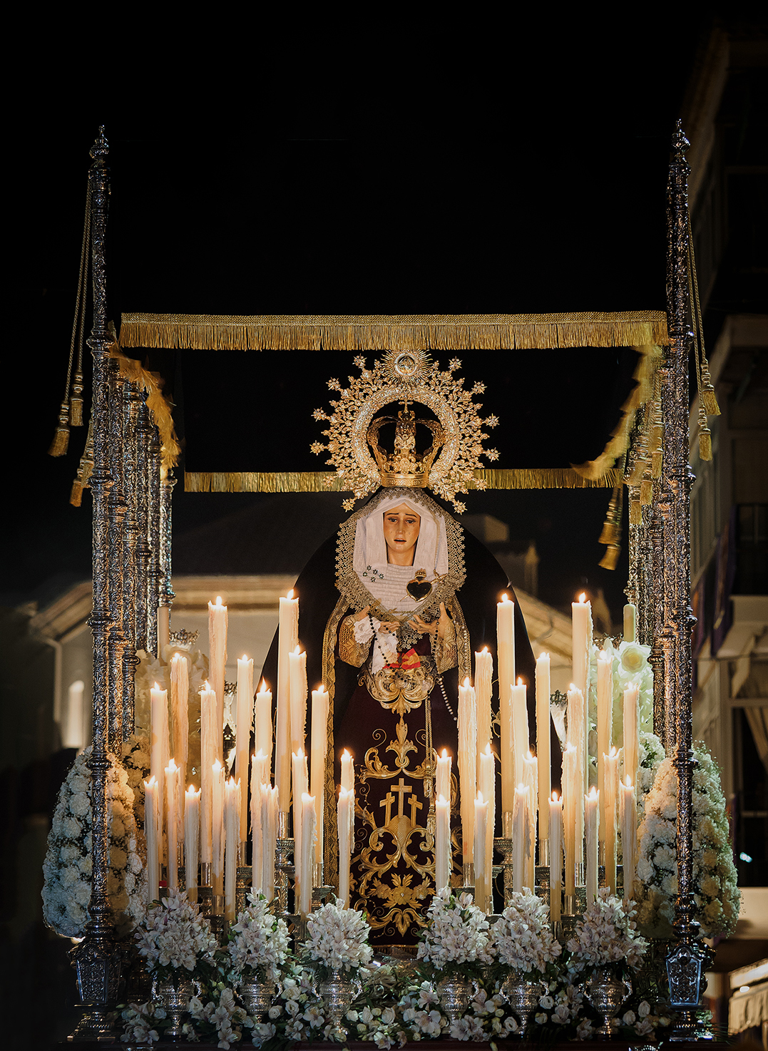 Nuestra Señora de la Amargura